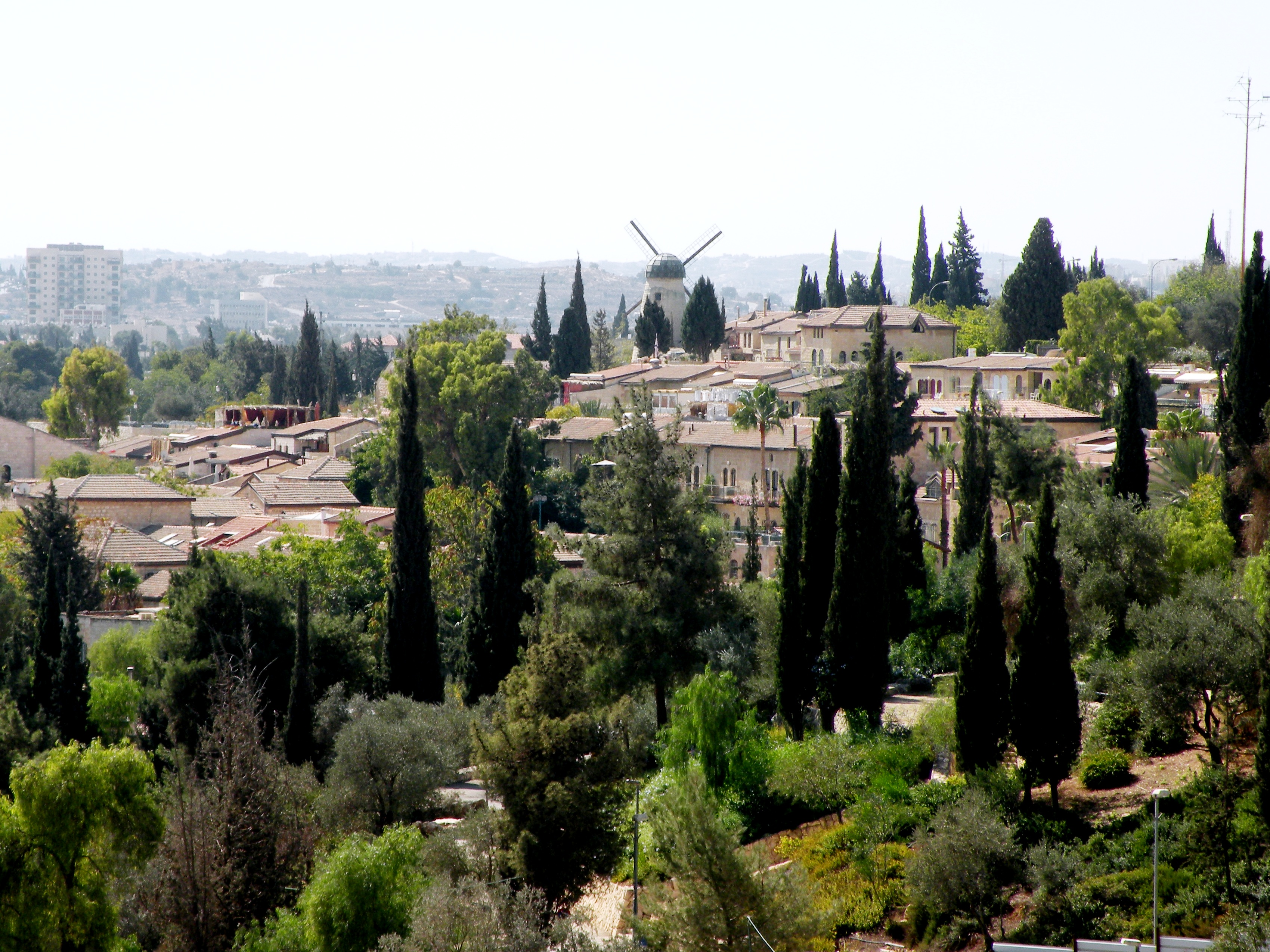 משכנות שאננים הייתה אחד ממפעלי הפיתוח הראשונים בעיר החדשה של ירושלים בתקופה העות'מאנית, והשכונה היהודית הראשונה שהוקמה בירושלים מחוץ לחומות העיר העתיקה. הוקמה ביוזמת משה מונטיפיורי. בתי השכונה כיום, לאחר שיפוץ ושימור, משמשים כמרכז כנסים, מרכז למוזיקה ובית הארחה.